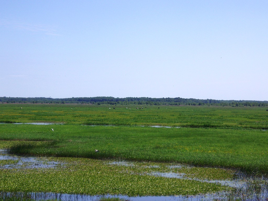 Biebrza, wieś Brzostowo